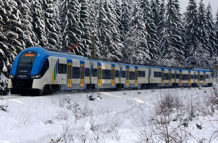 Elektryczny zespół trakcyjny 27WEb-002 w malowaniu przewoźnika Koleje Śląskie jako pociąg pasażerski KŚ99015 Skalnica mija bez zatrzymania przystanek kolejowy Sól Kiczora.